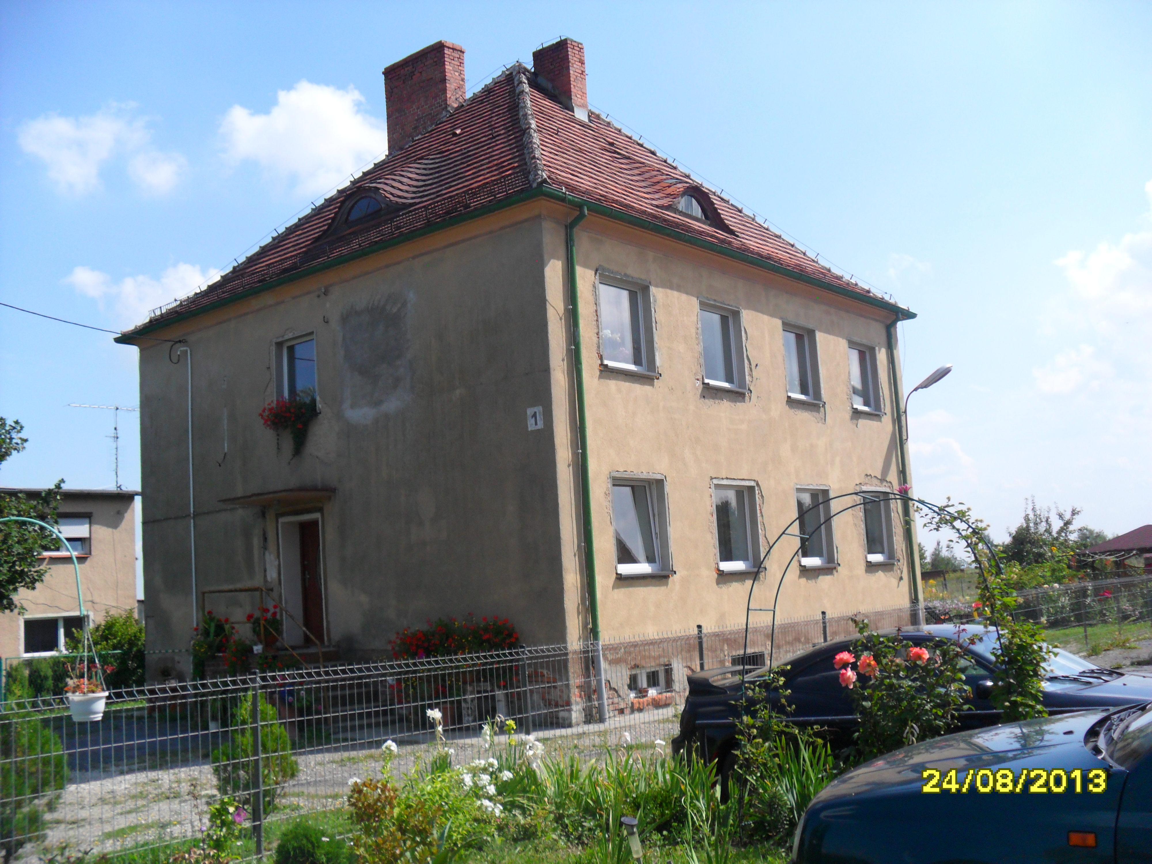 Gościce, budynek byłej Strażnicy Wojsk Ochrony Pogranicza Gościce (WOP), a od 16 maja 1991 roku Strażnica Straży Granicznej w Gościcach (SG). Obecnie budynek mieszkalny